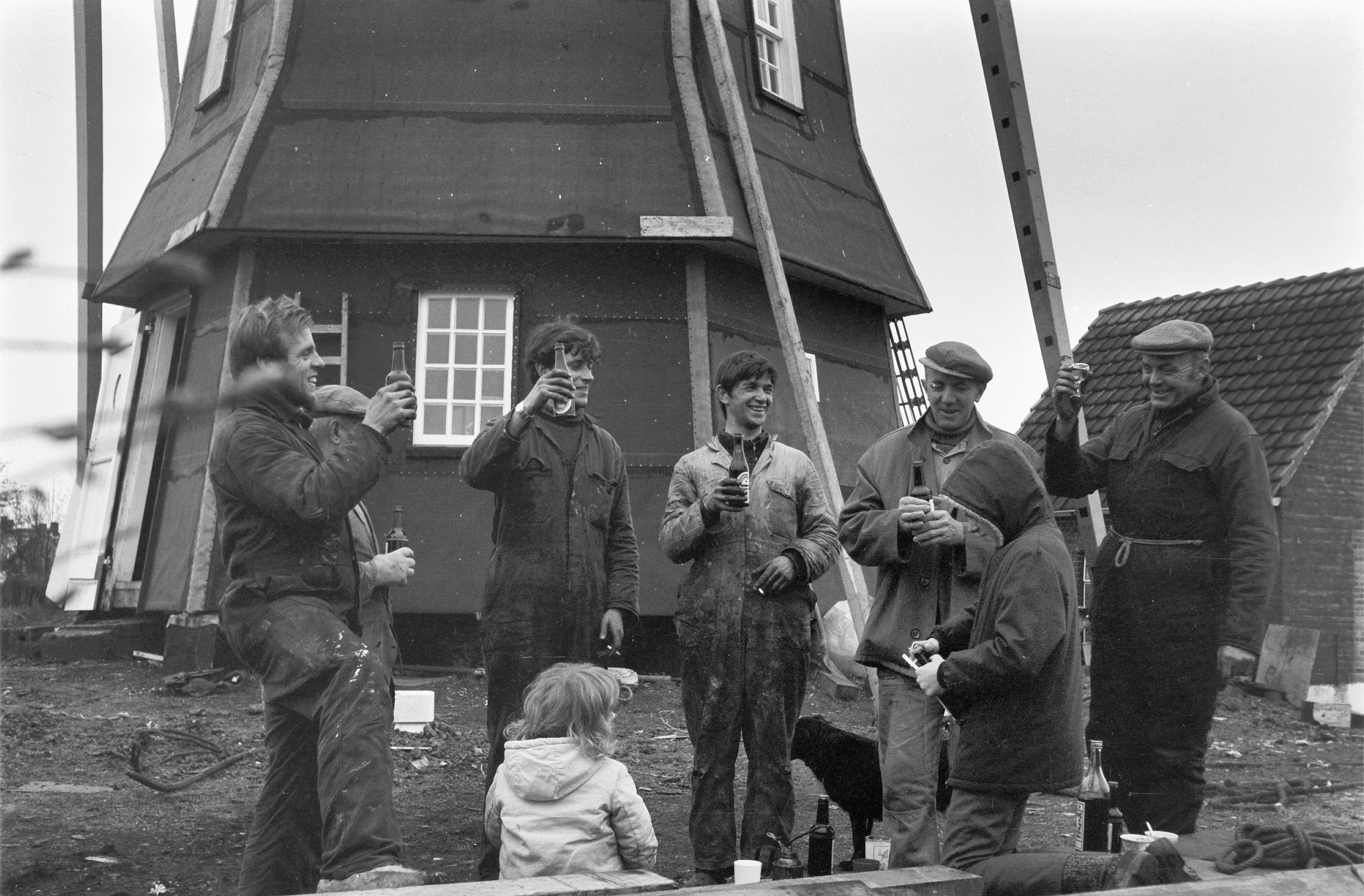 Zeskante Molen: Molenwerkers nemen pauze en drinken een biertje vóór de molen